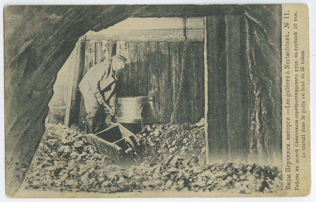 Работы в шахте Савинского серебросвинцового рудника на глубине 30 саженей (около 64 м)